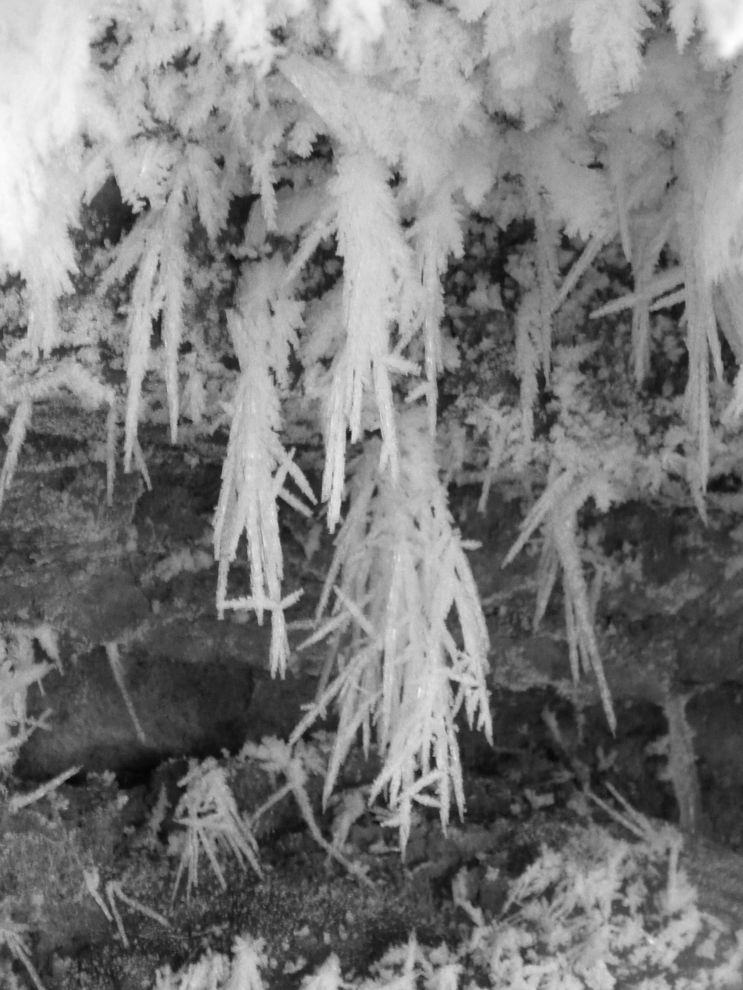 Намерзание льда у входа в пещеру